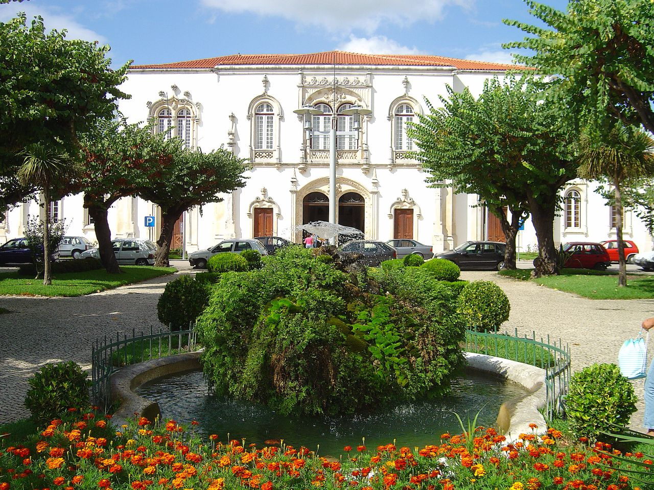 O edifício da Câmara Municipal, em frente, foi construído em estilo neo-manuelino.